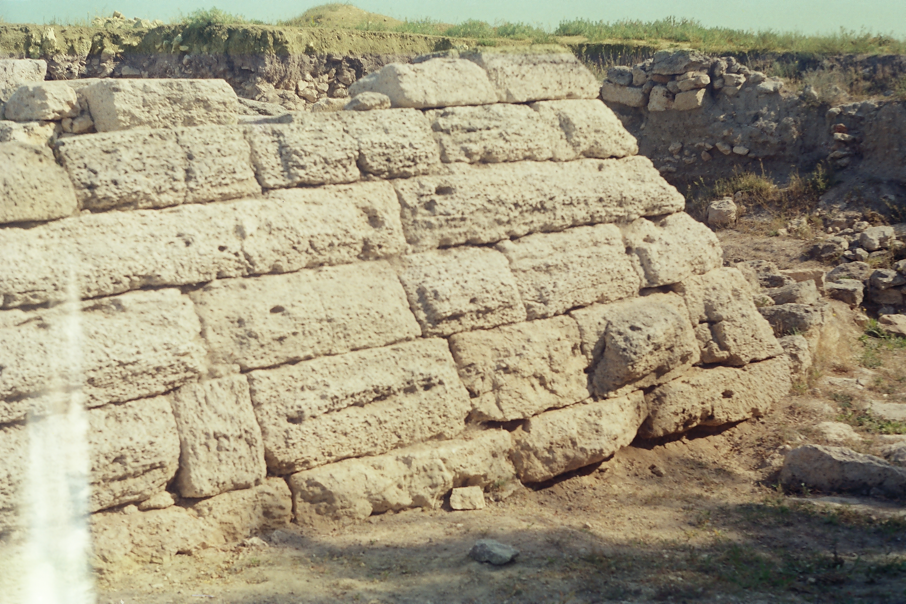 Калос Лимен - вид на нижнюю часть крепостной стены с наружной стороны. Хорошо заметна крупноблочная структура сложенная из обработанных каменных блоков. Нижняя часть стен имела большую толщину у основания - предположительно для улучшения обзора подножия стен защитниками крепости во время осады.